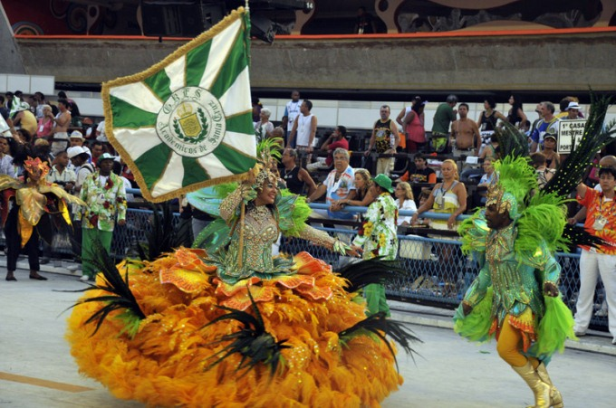 Desfile de 2009 dos Acadêmicos de Santa Cruz.Foto: Ricardo Almeida.